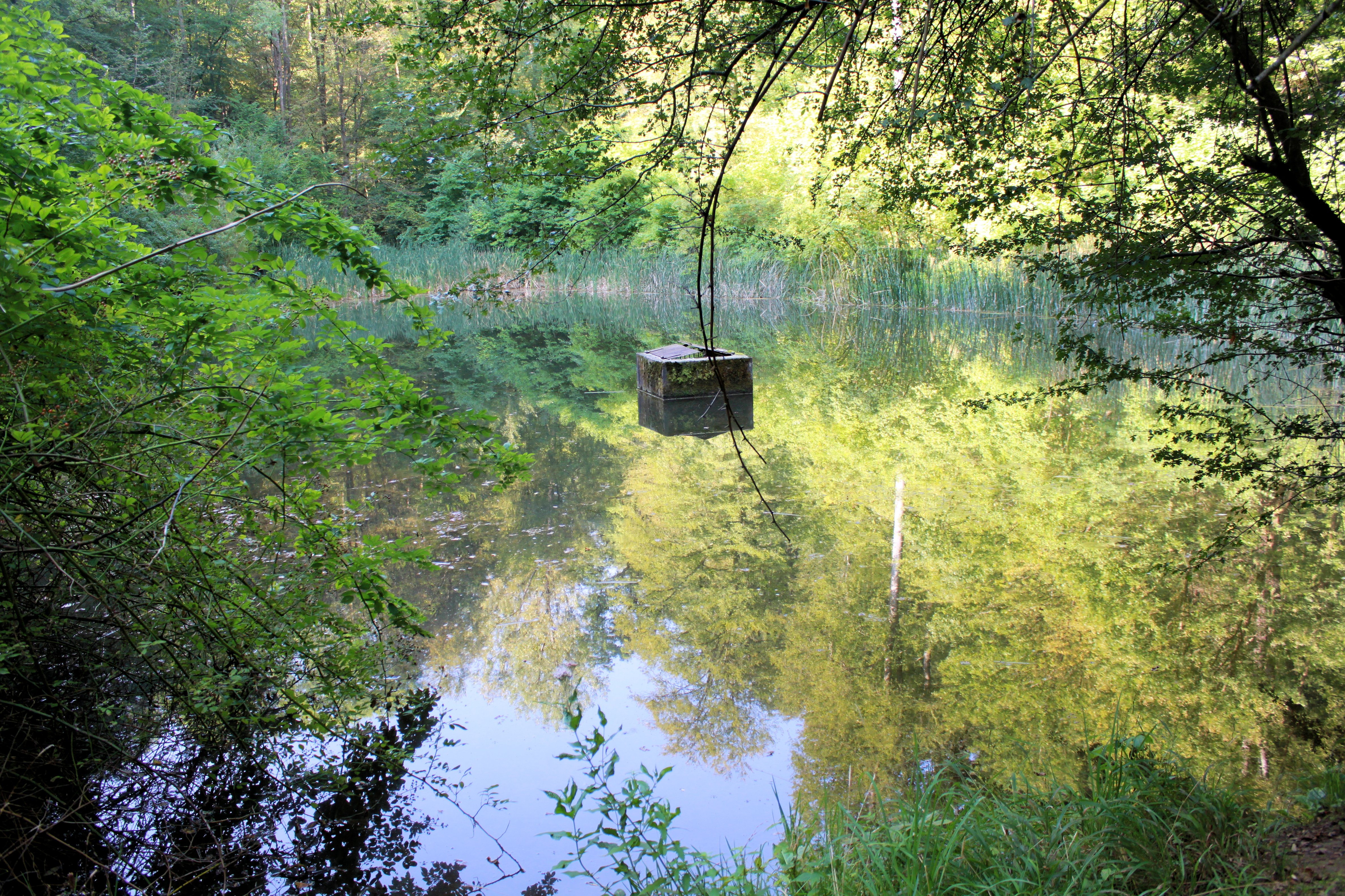 Der Buberlesweiher im Nordwesten von Botnang, Stuttgart, Baden-Württemberg, Deutschland.